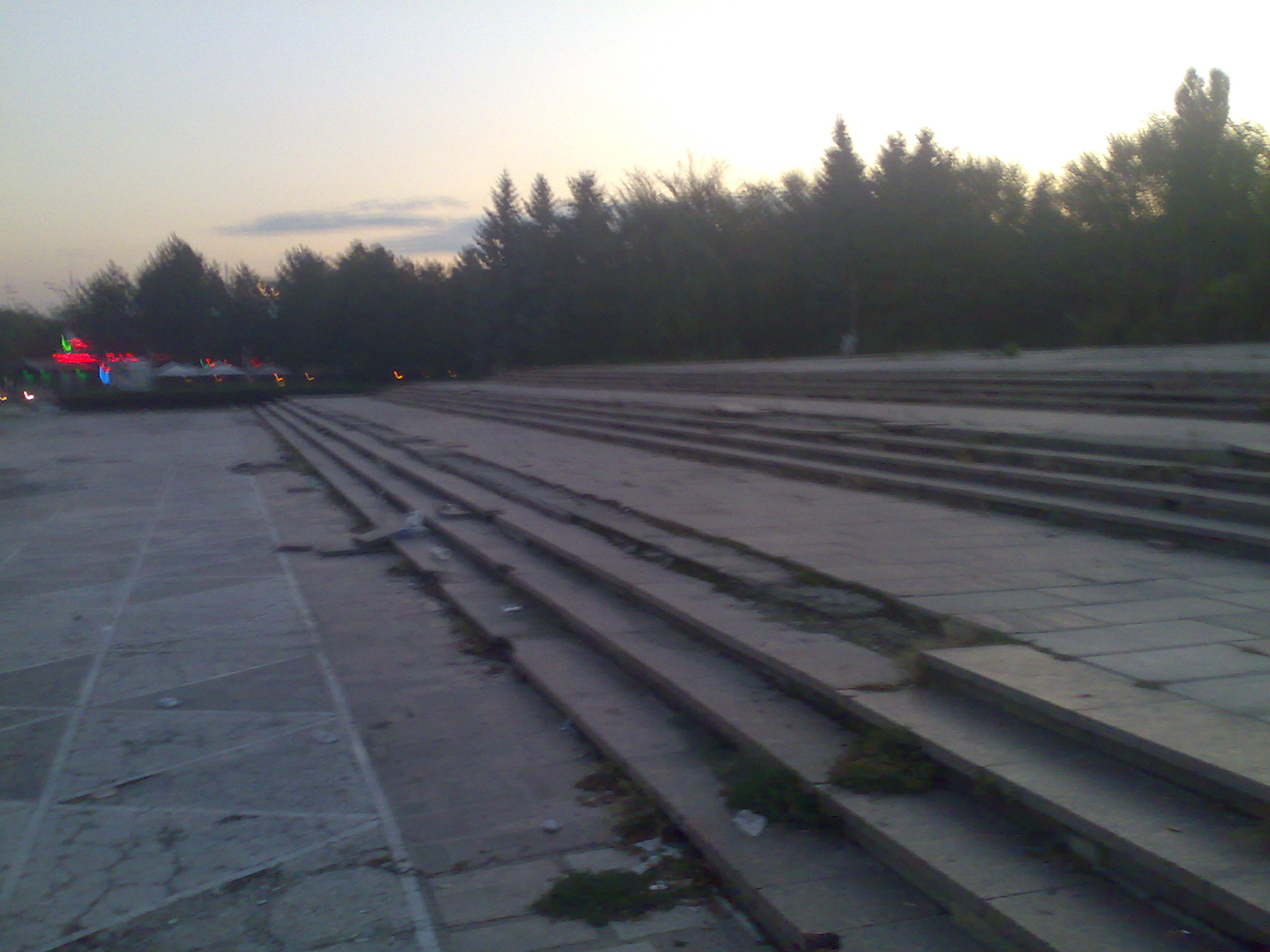 Фото аварийных ступеней Кишиневского государственного цирка